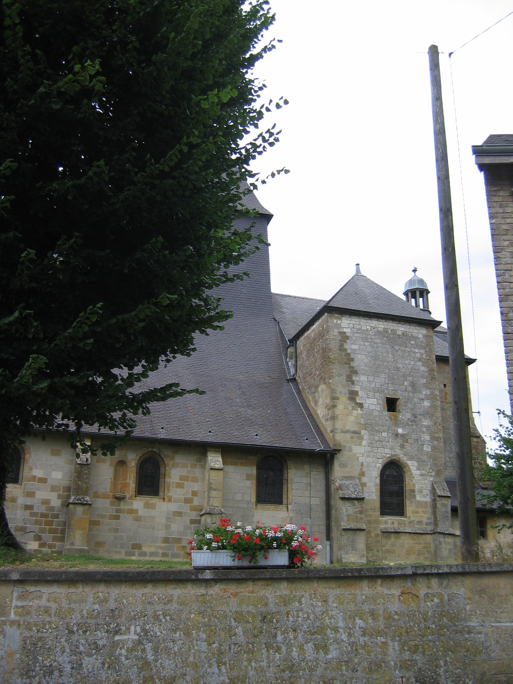 Eglise de Grivy-Loisy, en Ardennes (France)